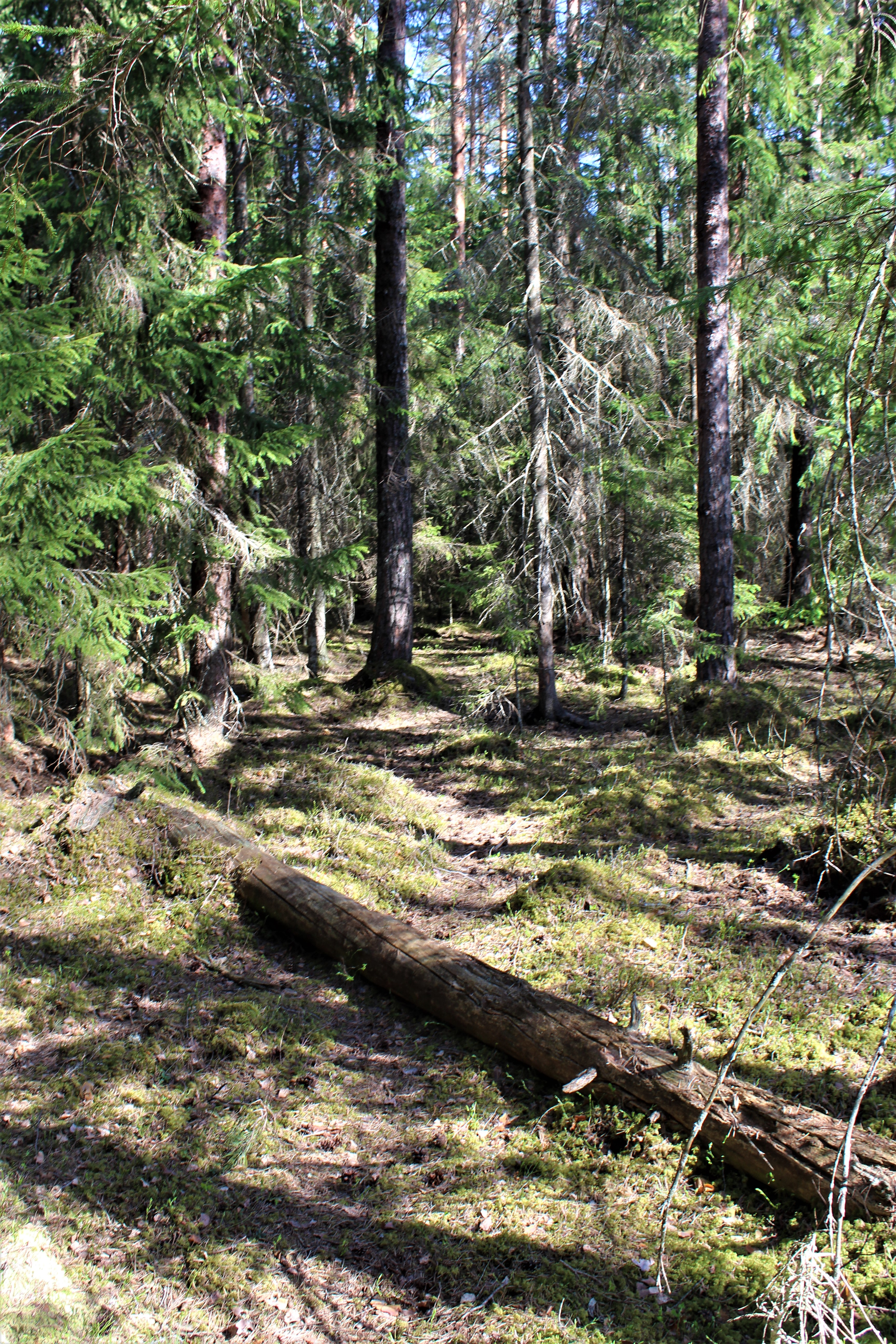 Dulbju acs purva dabas lieguma ziemeļdaļas mežs